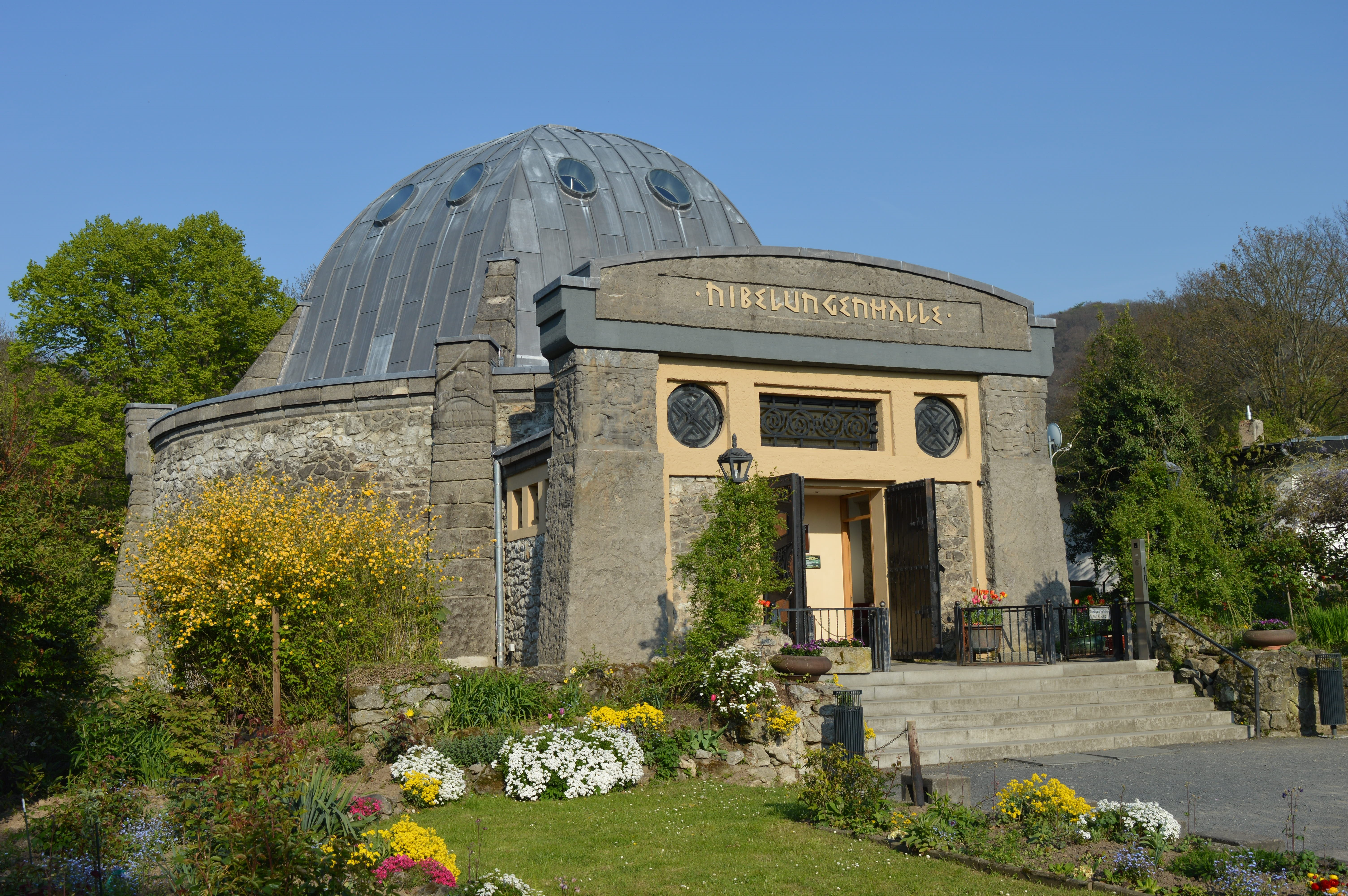 Die renovierte Nibelungenhalle im Sonnenschein